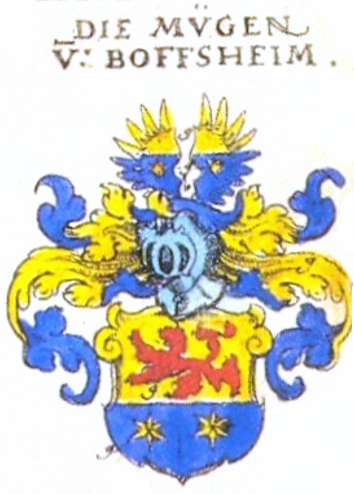 Stammwappen derer Mügen (Mueg, Mieg) von (de) Boffsheim (Boofzheim, Booftzheim, Boffzheim, Bofftzheim); in: Johann Siebmacher: New Wappenbuch; eingescannt aus: Horst Appuhn (Hrsg.), Johann Siebmachers Wappenbuch. Die bibliophilen Taschenbücher 538, 2. verbesserte Auflage , Dortmund 1989 Elsässische [Ritterschaft und Adel], Blatt 196